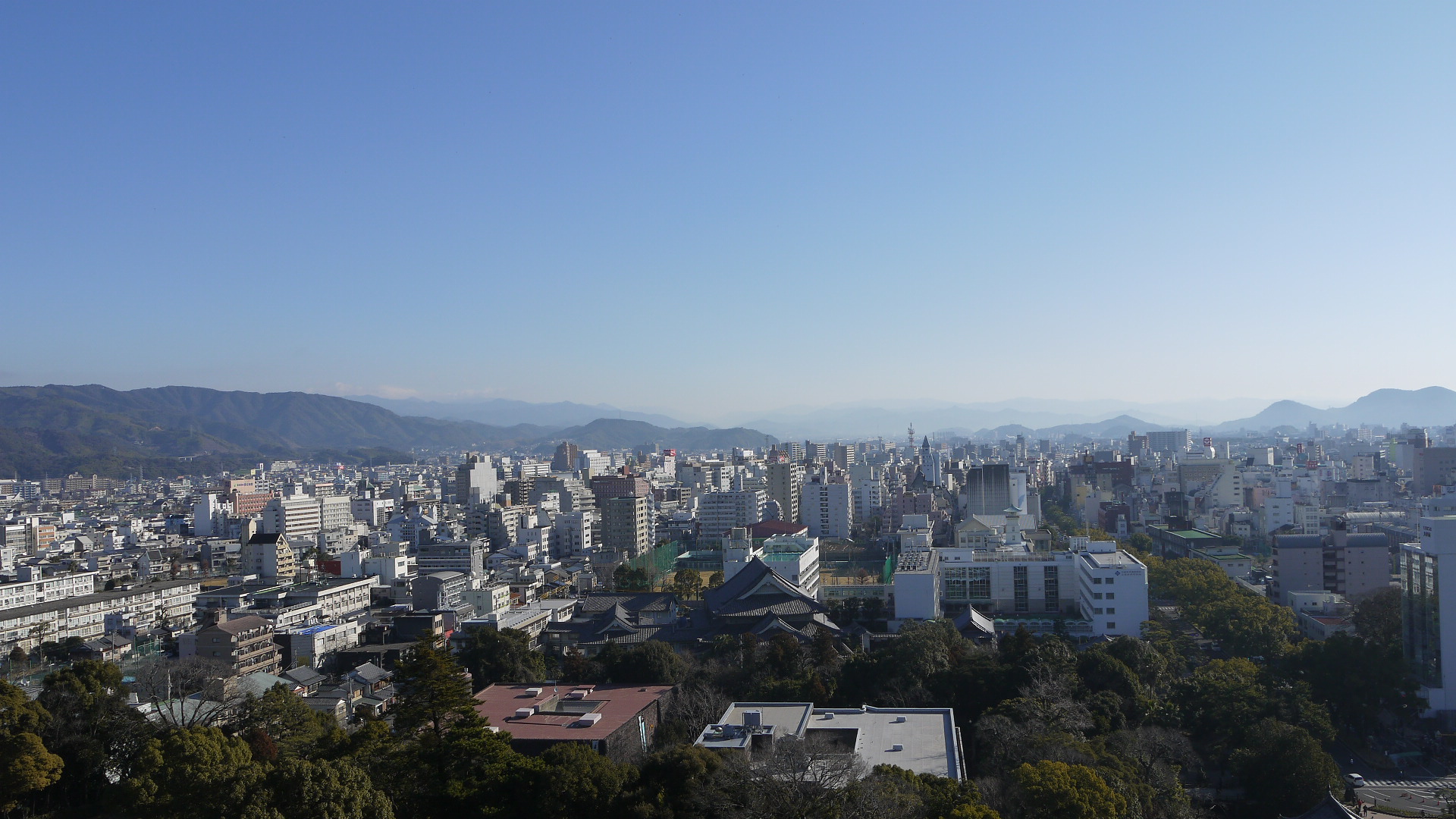 高知城 天守からの景色3 Kochi Castle